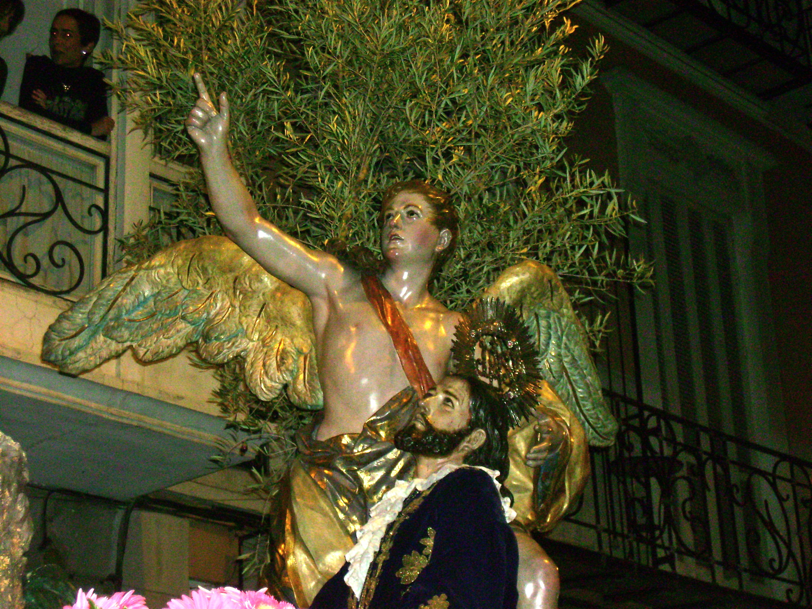 La Oración en el Huerto, obra del escultor Francisco Salzillo (1754). Fotografía tomada durante la Procesión del II Congreso Internacional de Cofradías y Hermandades, celebrado en Murcia.